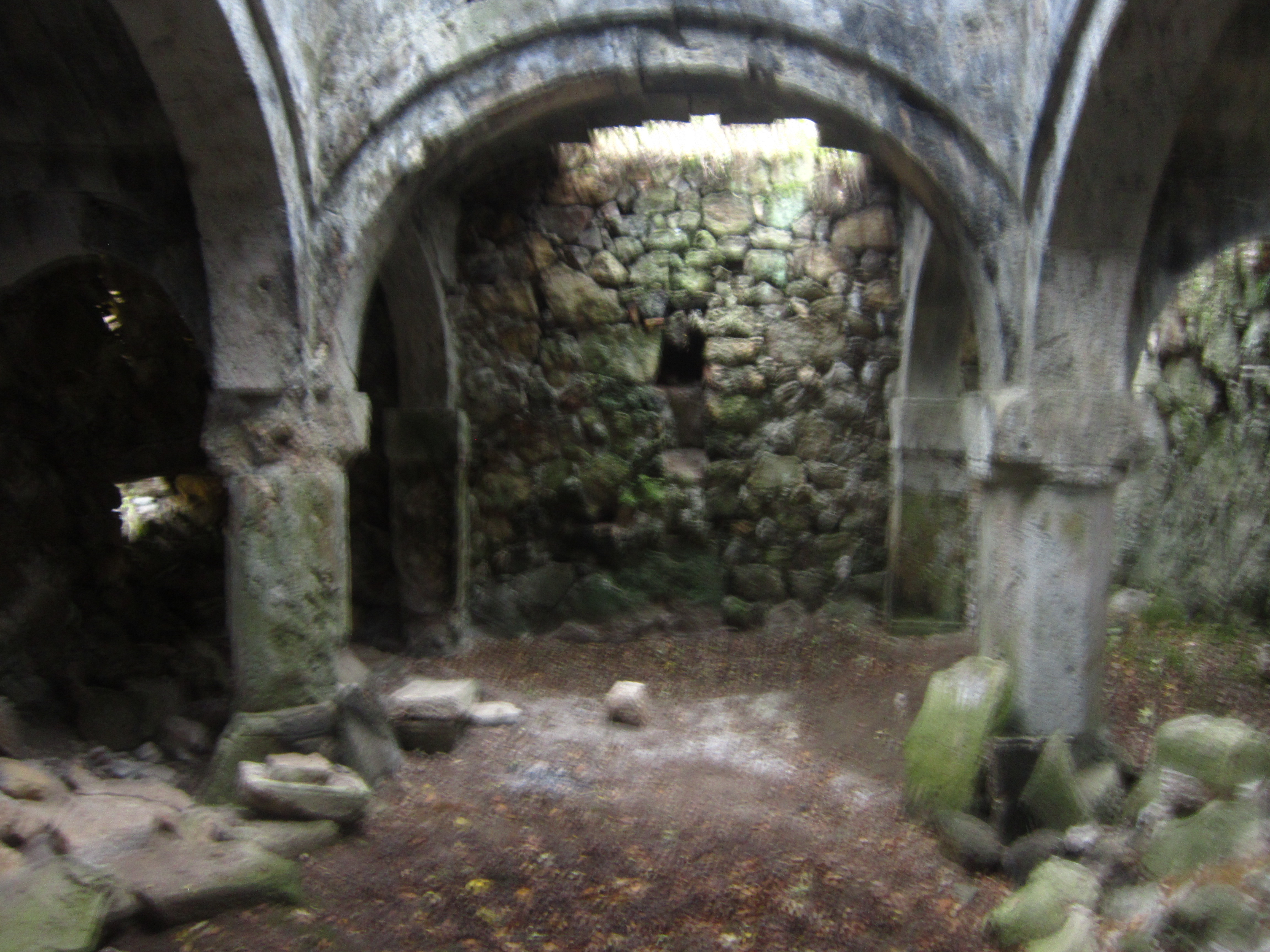 Վանական համալիր Շխմուրադ 38/16